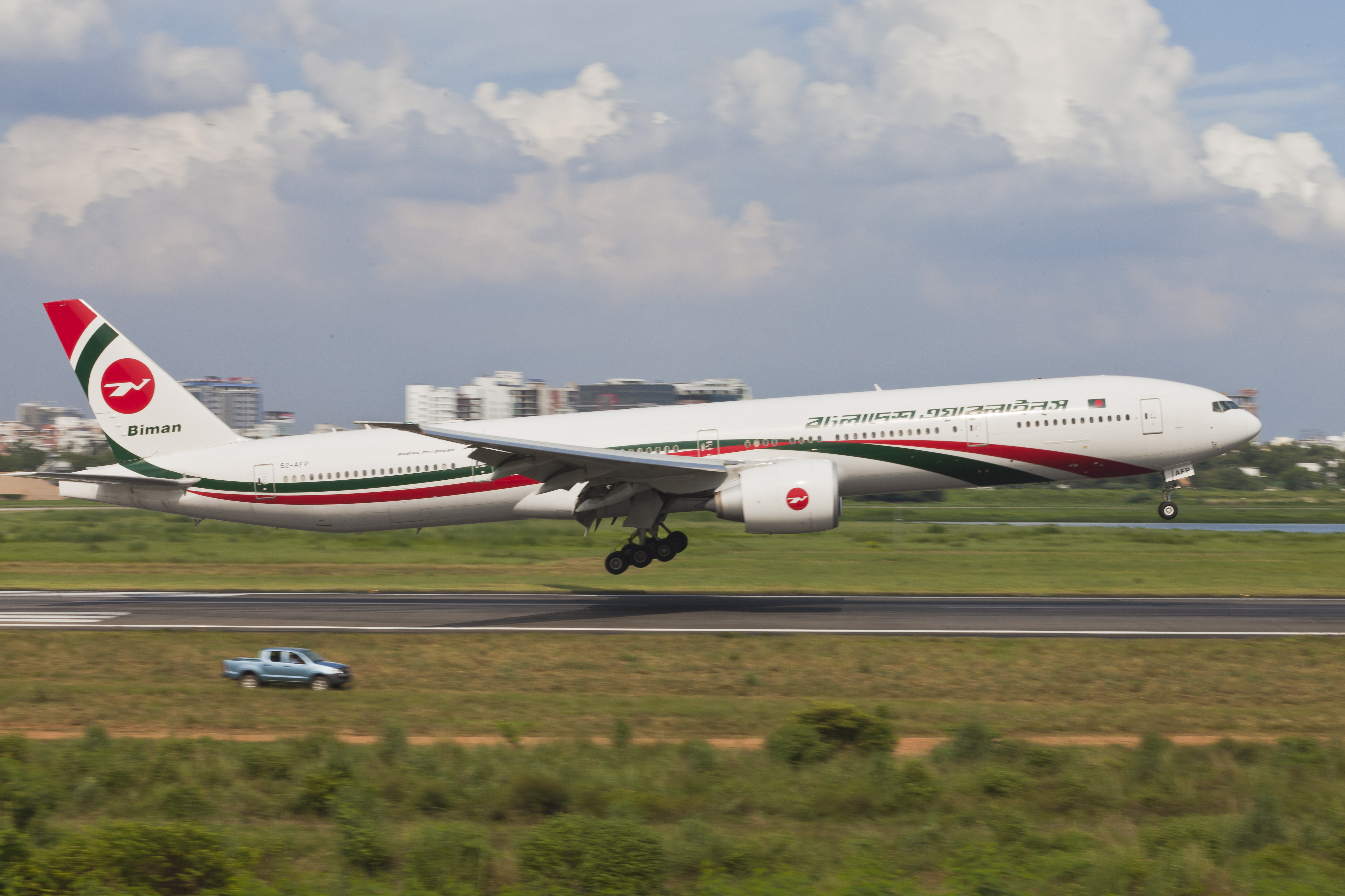 Biman Bangladesh Airlines Boeing 777-3E9ER S2-AFP Arun Alo Landing